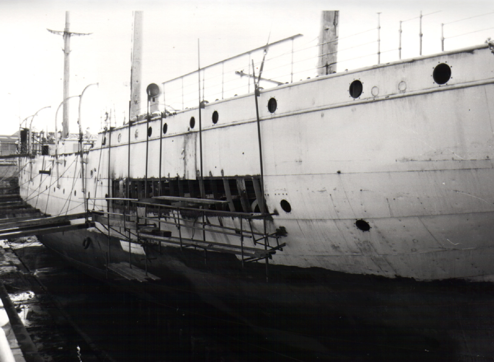 trois-mâts carré Duchesse Anne en reconstruction, remplacement des tôles (Dunkerque, Nord, France).